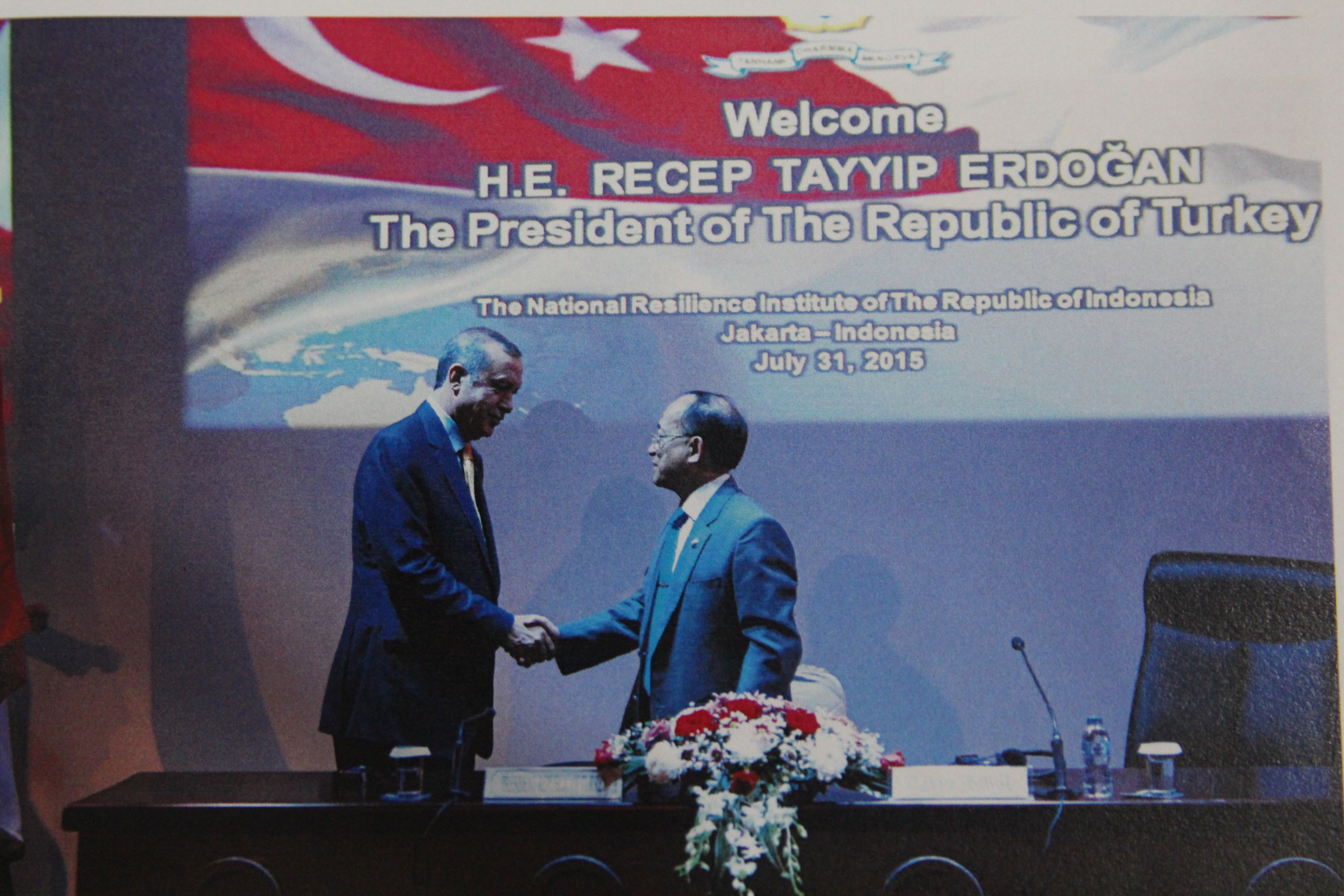 Presidential Lecture Erdogan